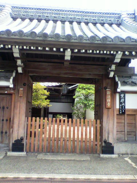 壬生の新徳寺、前からの山門